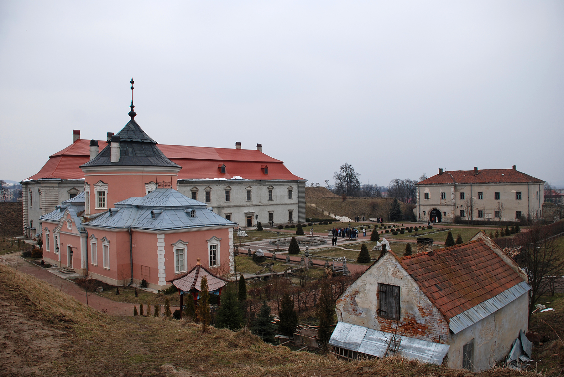 Замок (мур.), Золочів, вул.Тернопільська, 5